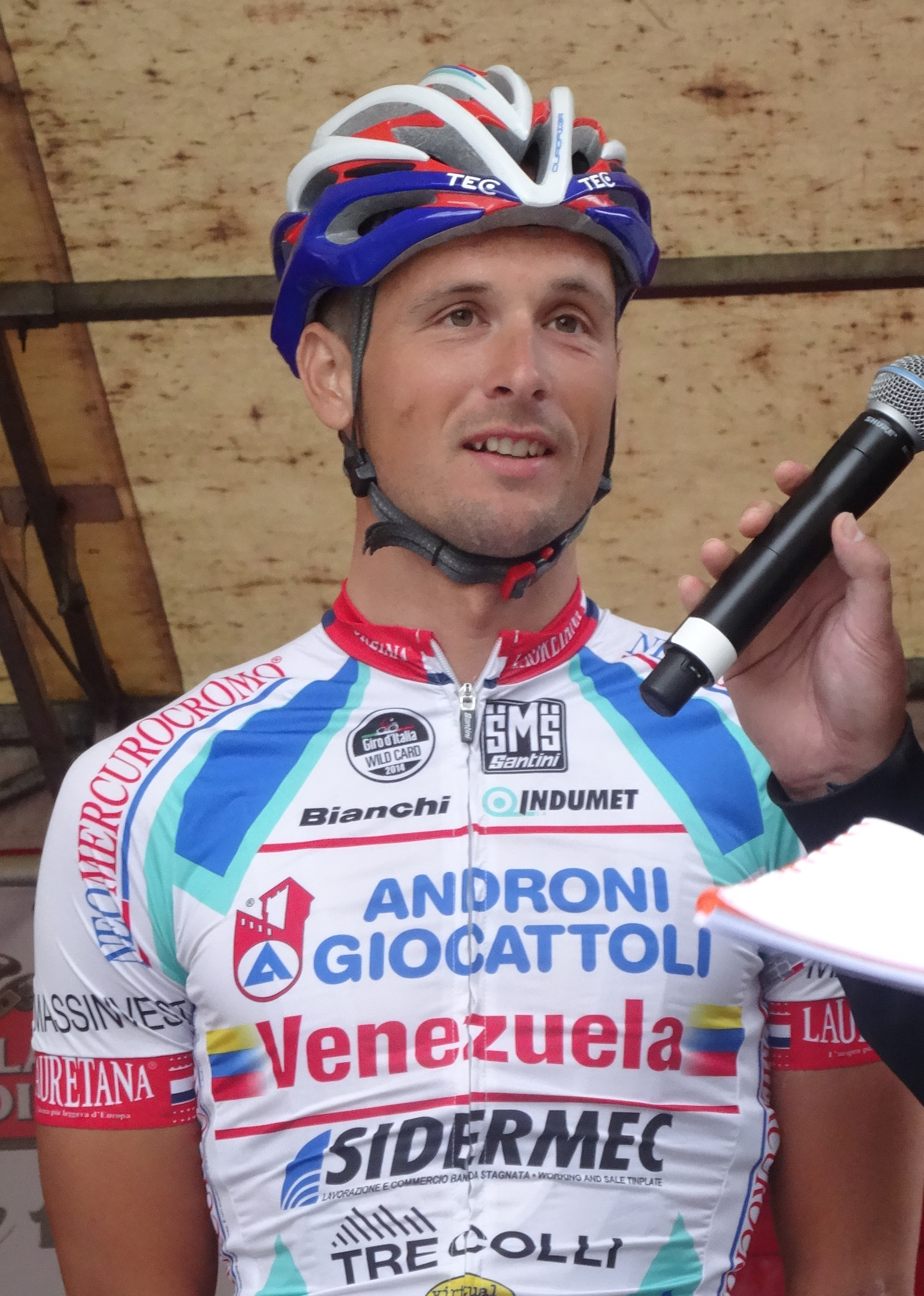 Reportage photographique réalisé le dimanche 14 septembre à l'occasion du départ et de l'arrivée du Grand Prix Jef Scherens 2014 à Louvain, Belgique.